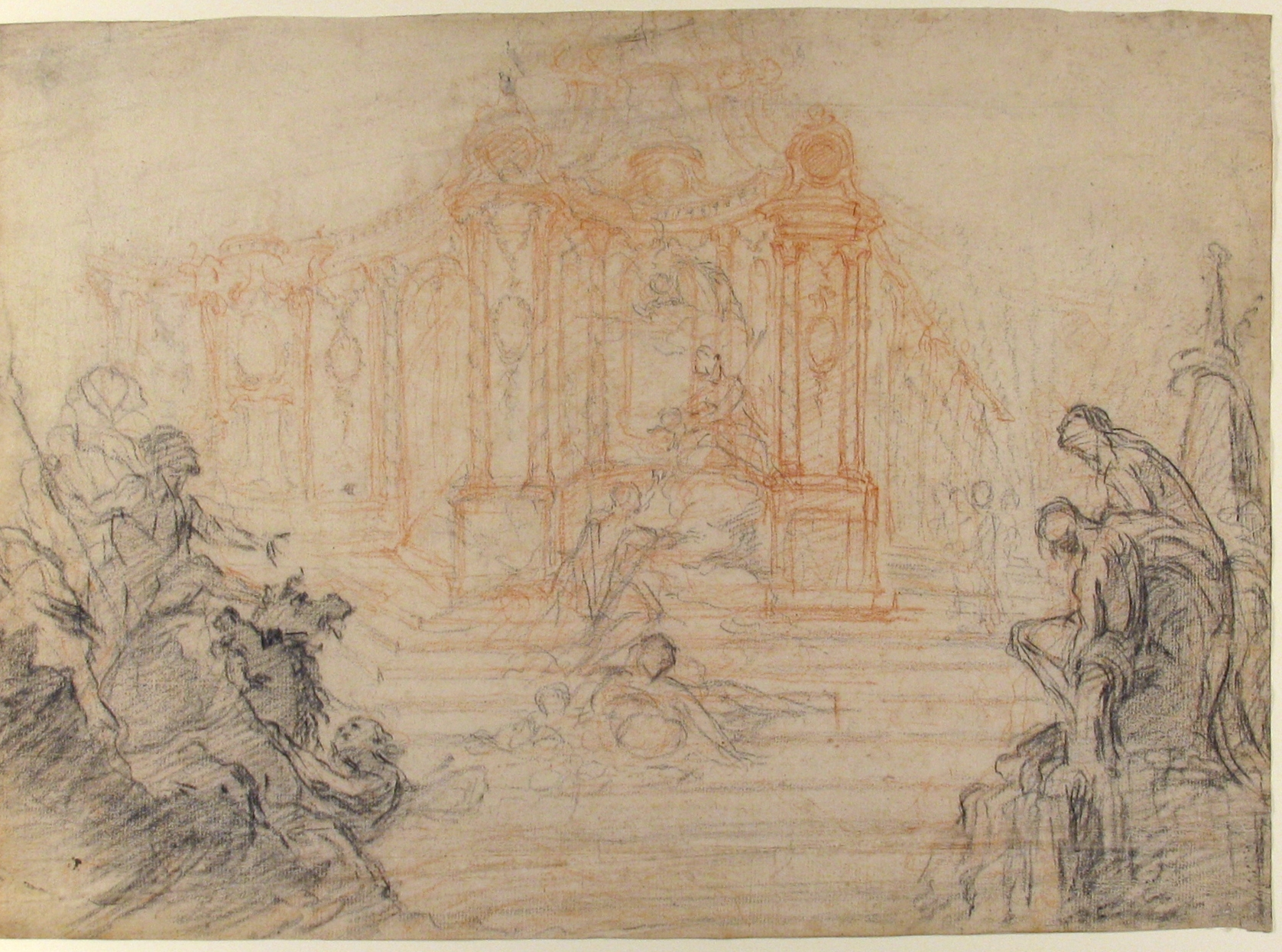 Drawing; Drawings